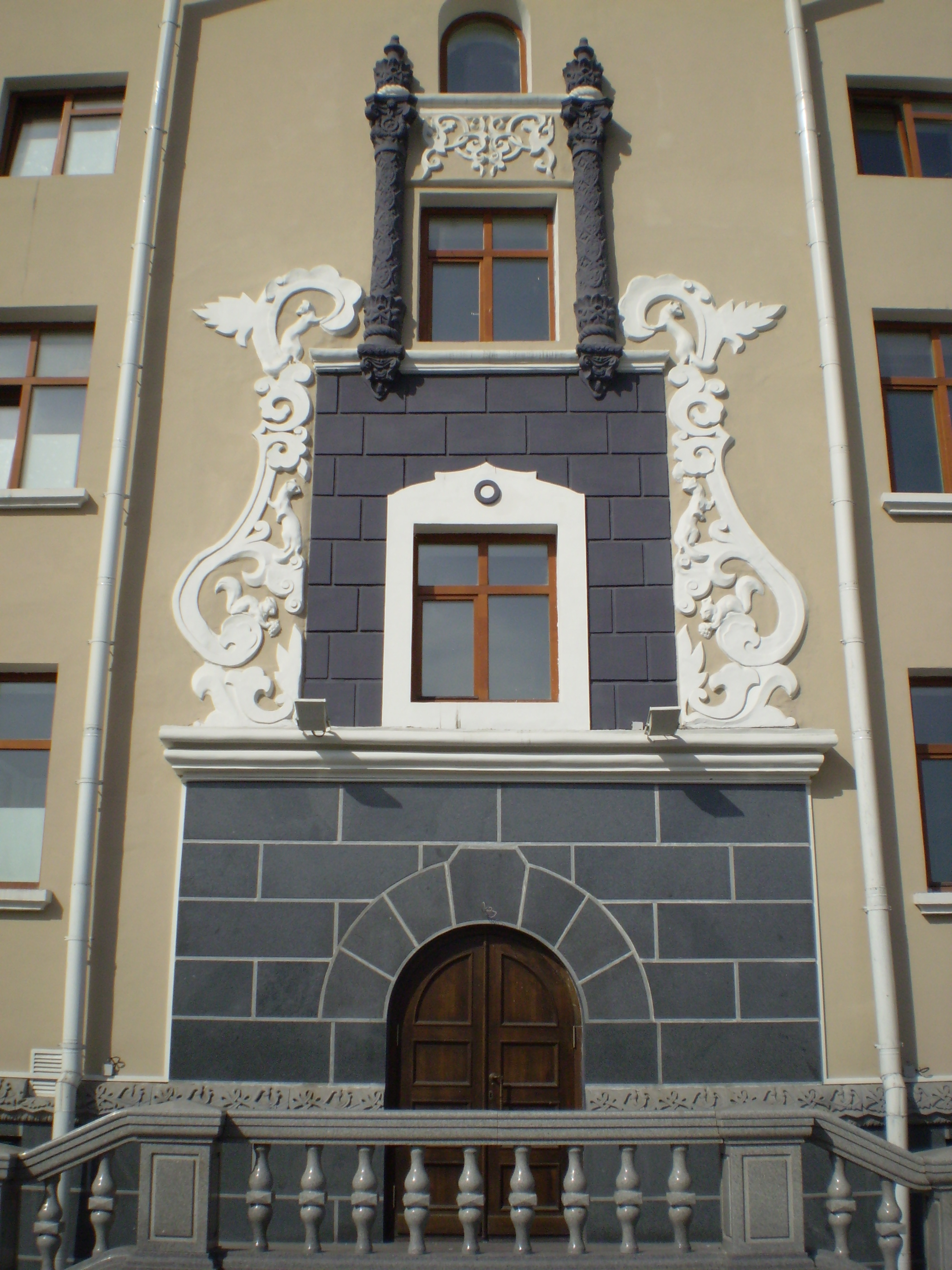 Бурятский академический театр оперы и балета. Деталь.